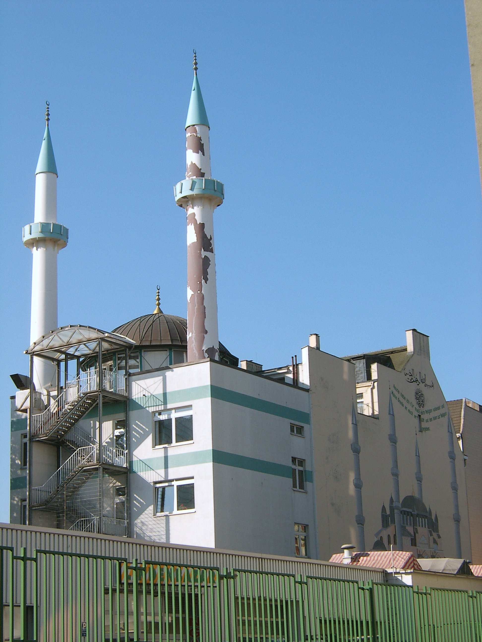 Die Centrum-Moschee in der Böckmannstraße in St. Georg ist eine der größeren Moscheen in Hamburg.